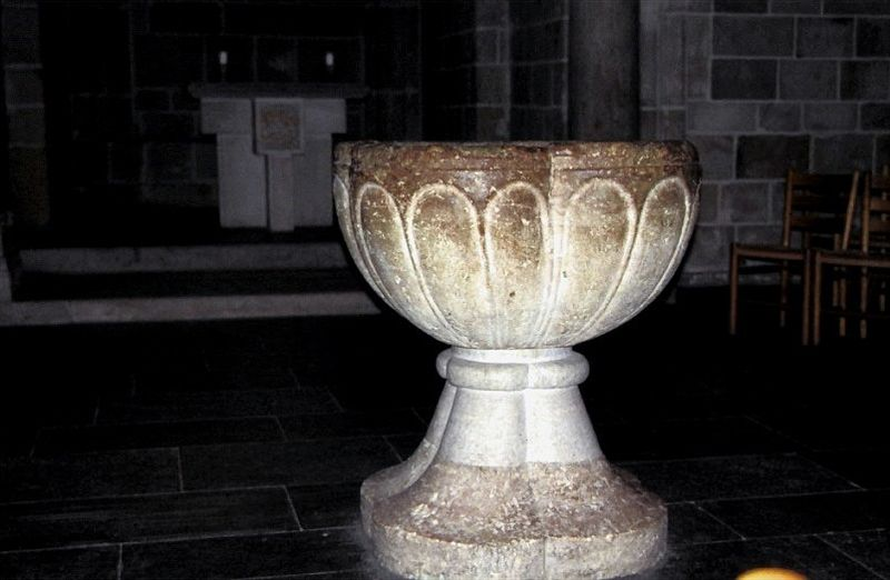 Lund Domkyrka i Skåne, Sverige. Lund Domkirke, døbefont